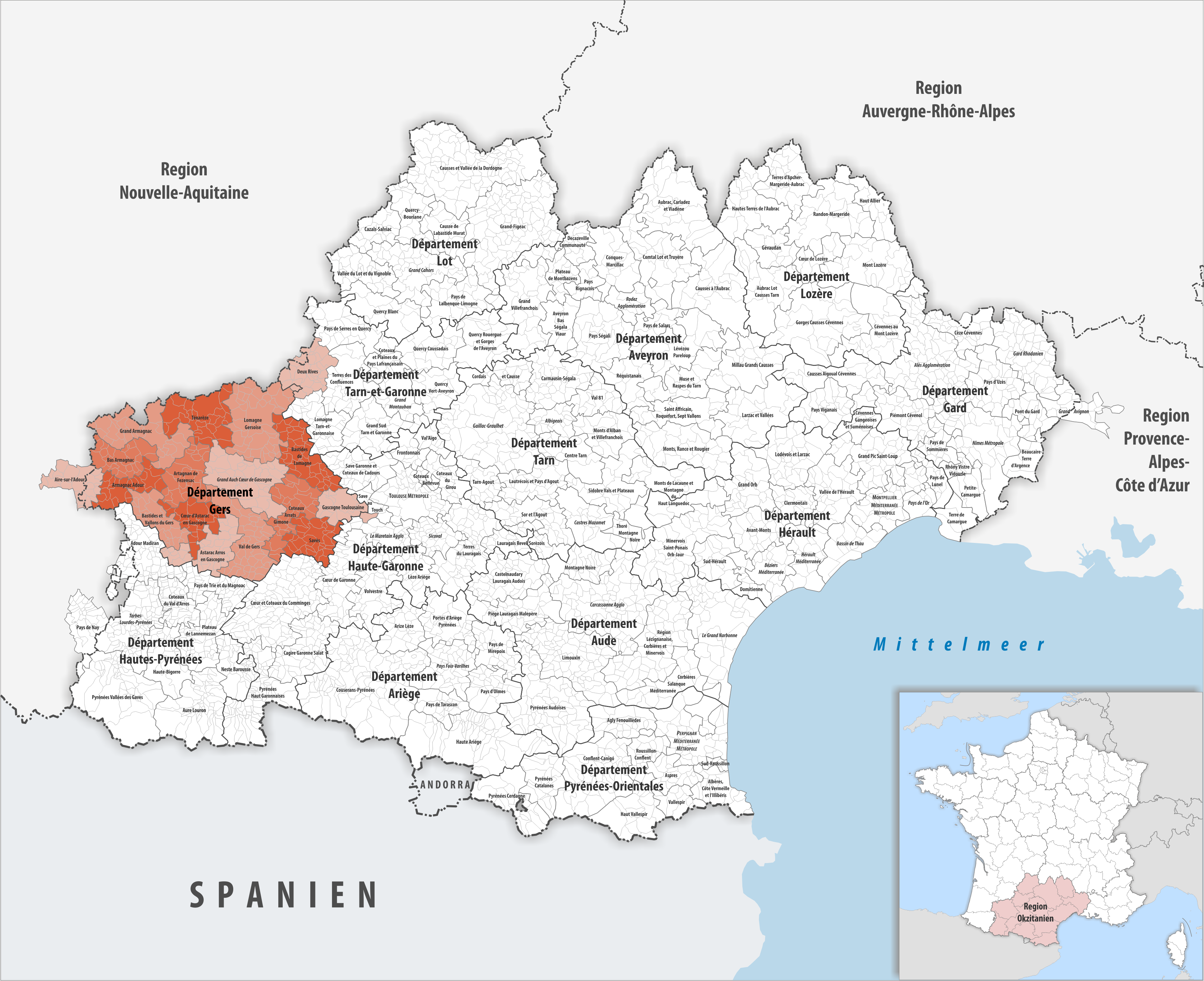 Gemeindeverbände im Département Gers